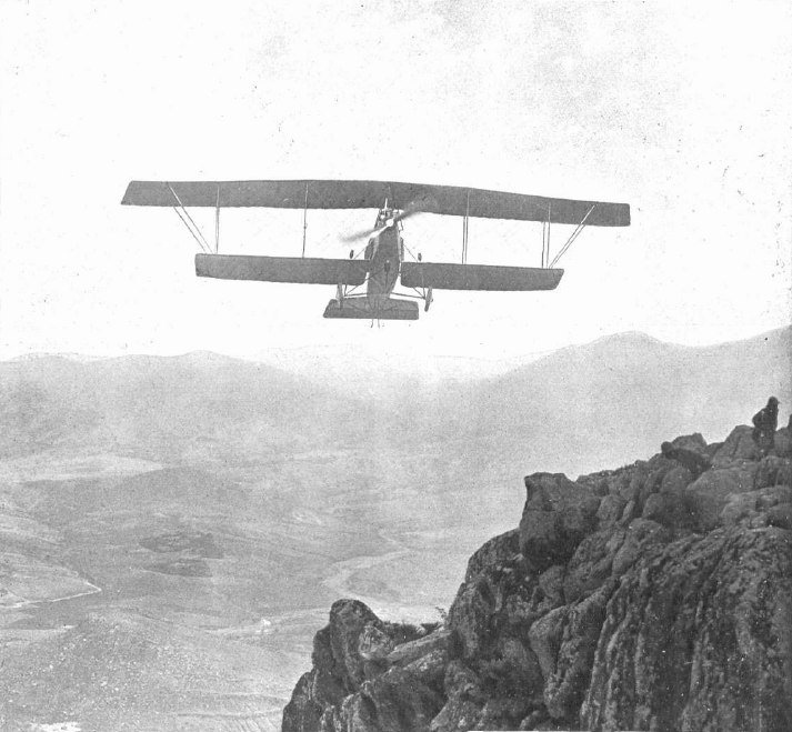 Fragmento de fotografía de un aeroplano del ejército español volviendo a su base en la zona de Tetuán publicada en 1913 a raíz de haber resultado heridos por el enemigo dos tripulantes de otro aparato